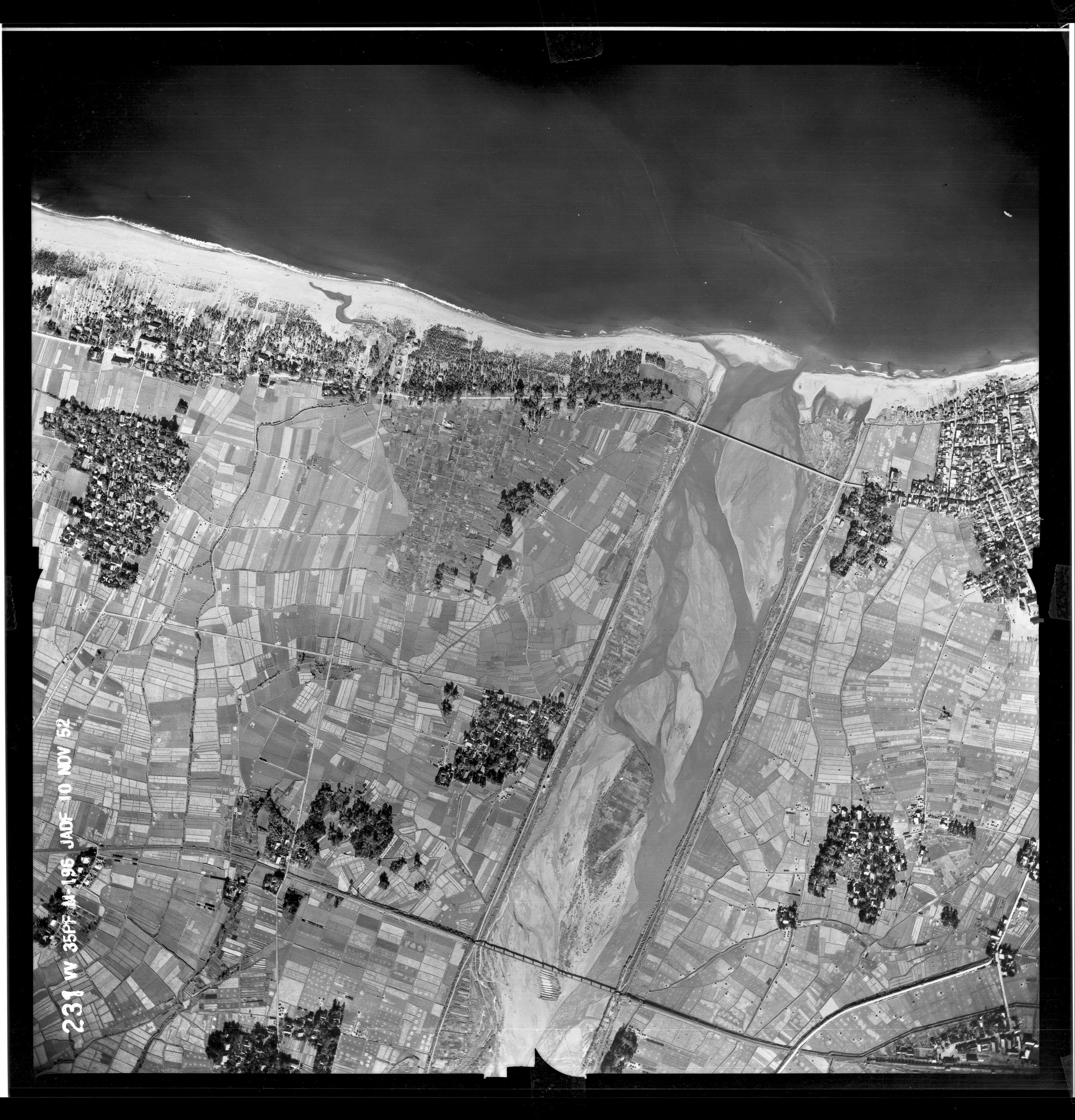 昭和21年7月22日、米軍による浜黒崎村該当区域の空中写真。国土地理院地図・空中写真閲覧サービスより。